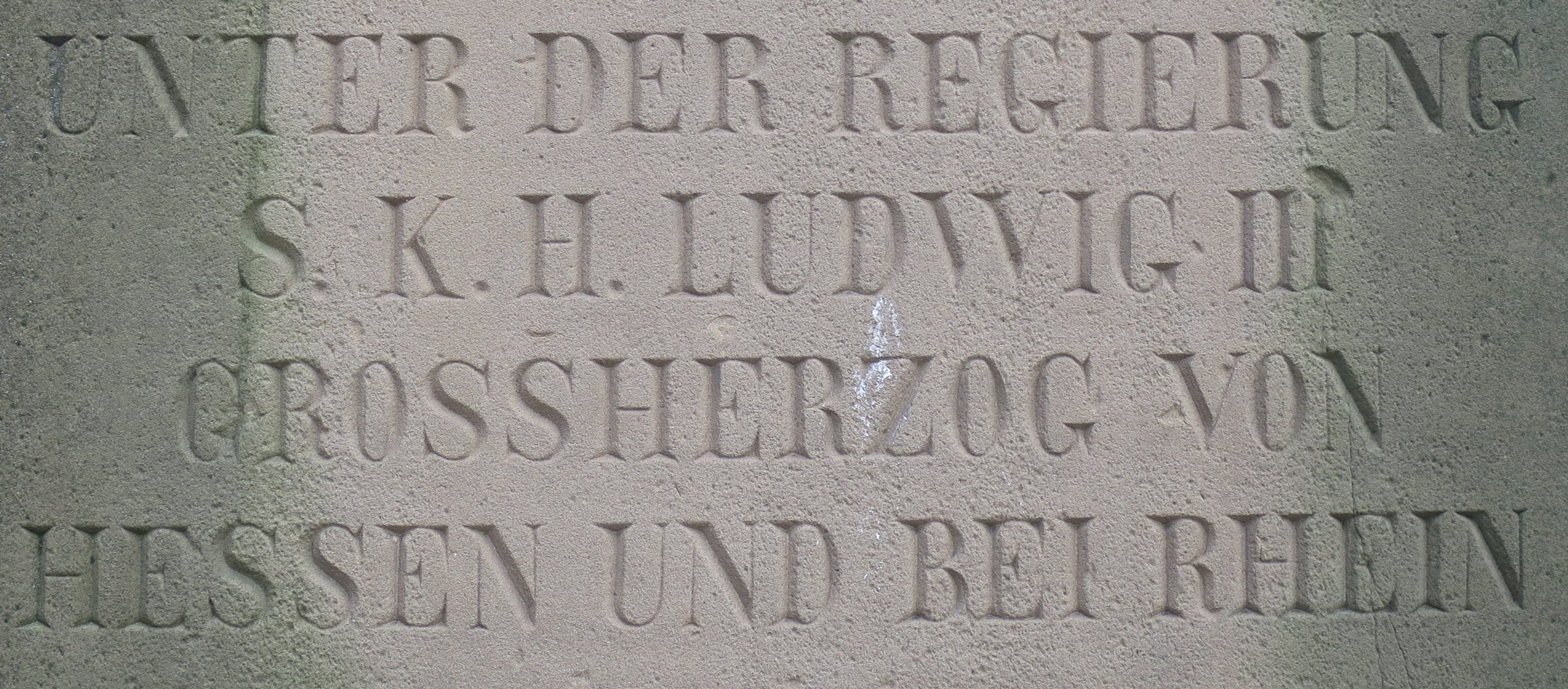 Inschrift auf dem Veteranendenkmal in Worms